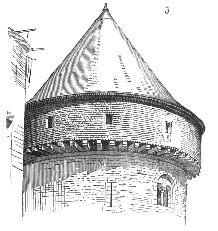 Hourd du château de Laval, in Dictionnaire raisonné de l’architecture française du XIe au XVIe siècle, Eugène Viollet-le-Duc.